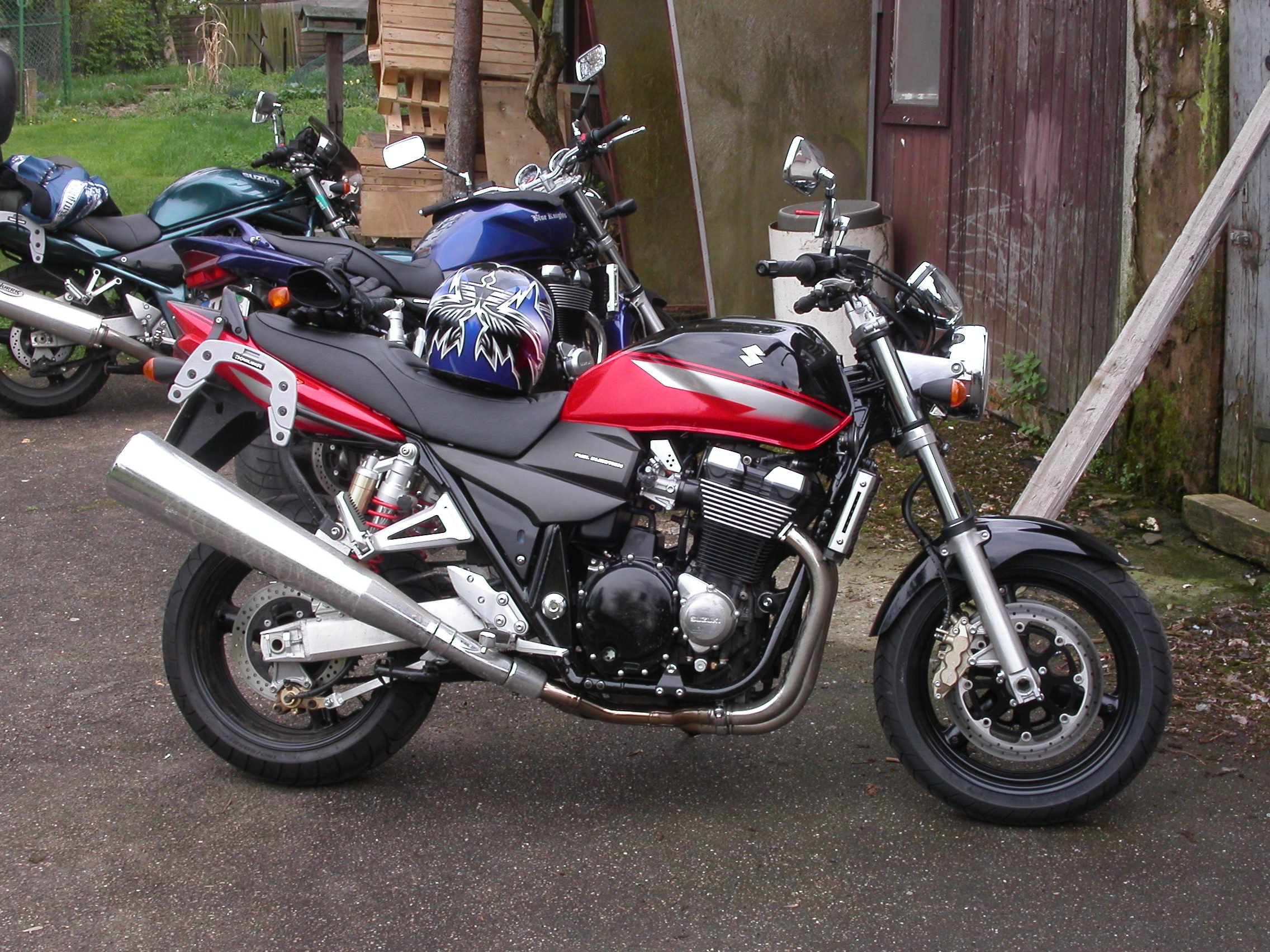 Suzuki GSX 1400, Baujahr 2004